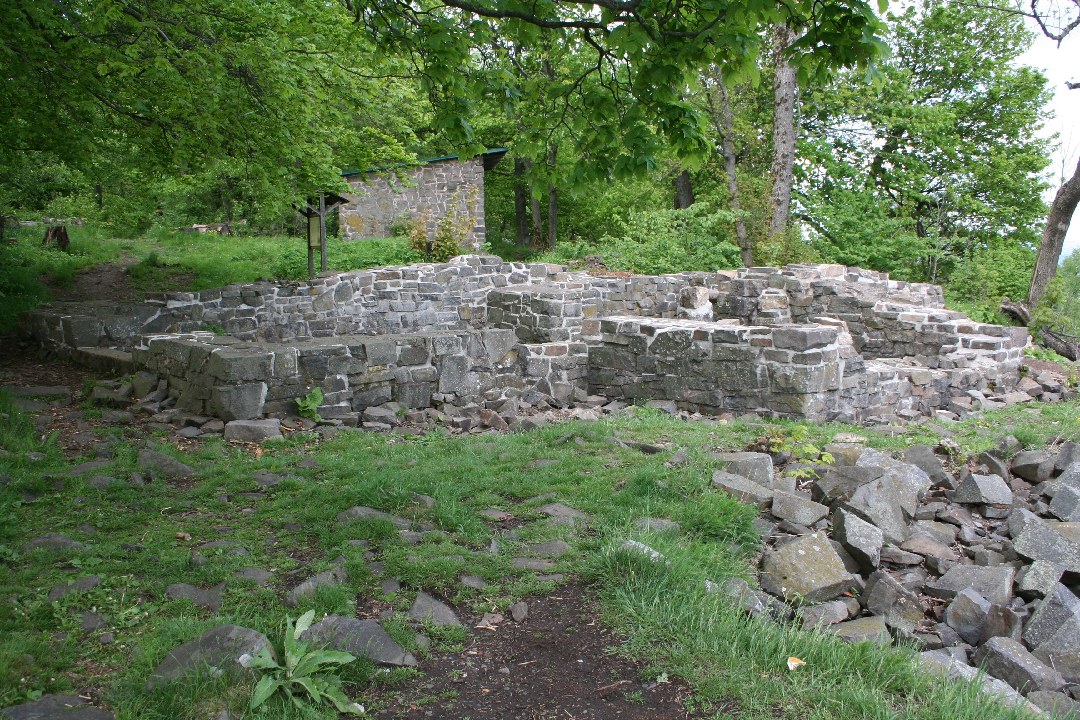 Steinsburg